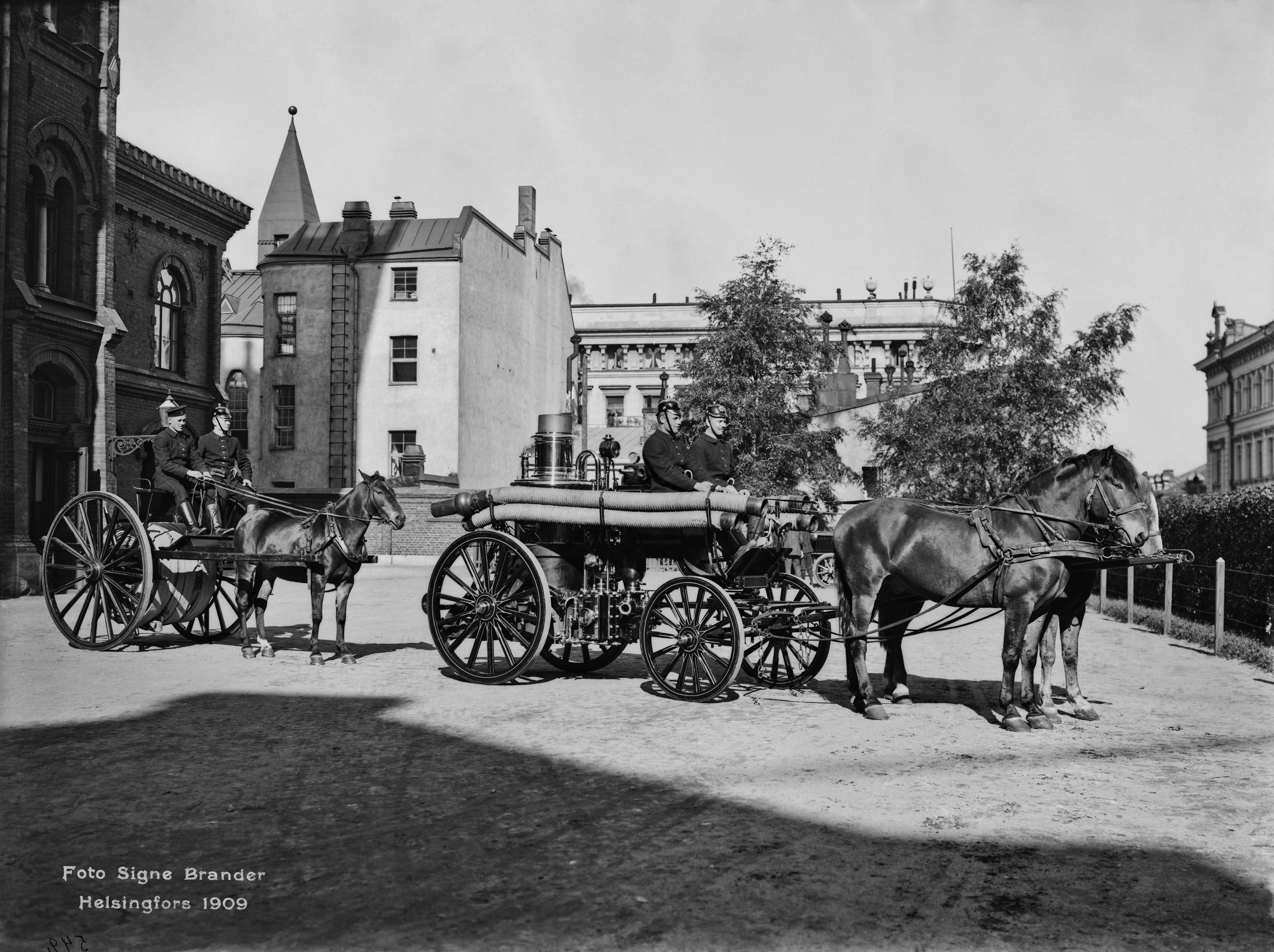 Pääpaloaseman piha, Korkeavuorenkatu 26. Raskas höyryruisku vuodelta 1896 letkurattaineen.; negatiivi ja vedos, lasi paperi pahvi, mv